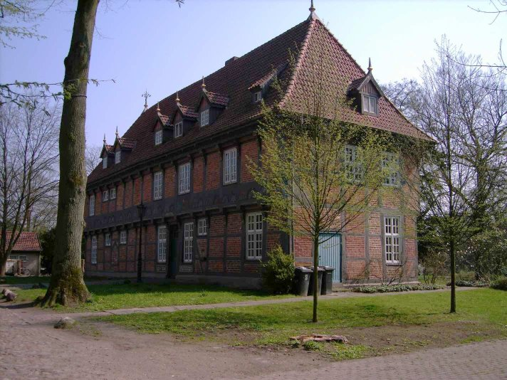 Vorderseite des Haupthauses vom Gut Sandbeck in Osterholz-Scharmbeck. Photographiert im April 2005.